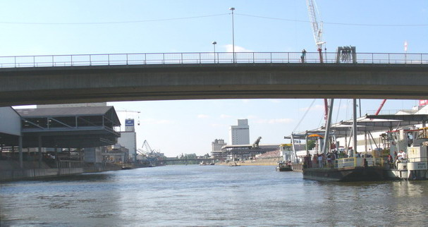 Stuttgart-Hafen/harbour 18-6-2005 selbst fotografiert von user:Enslin